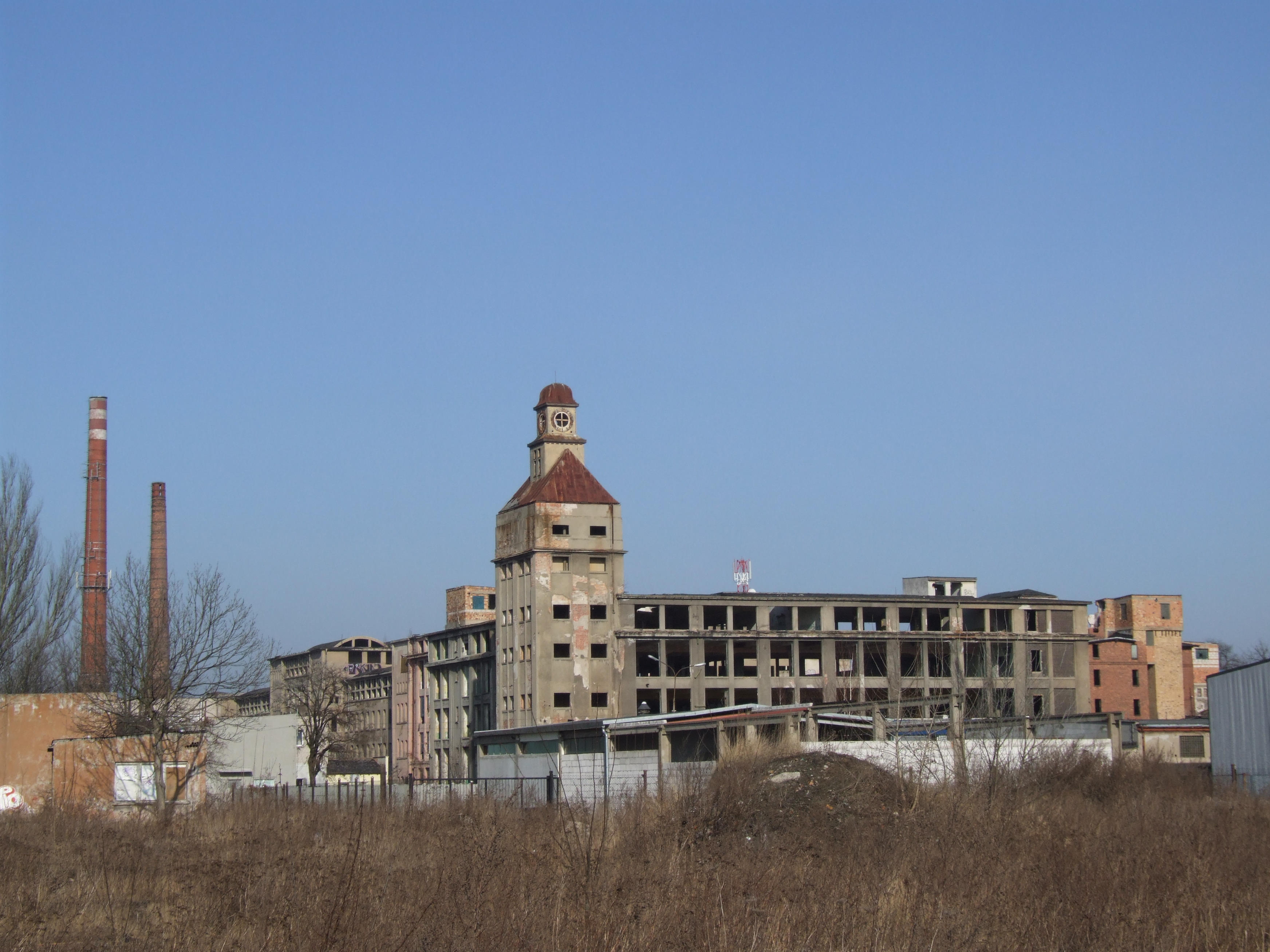 Ruiny fabryki Odra w Nowej Soli